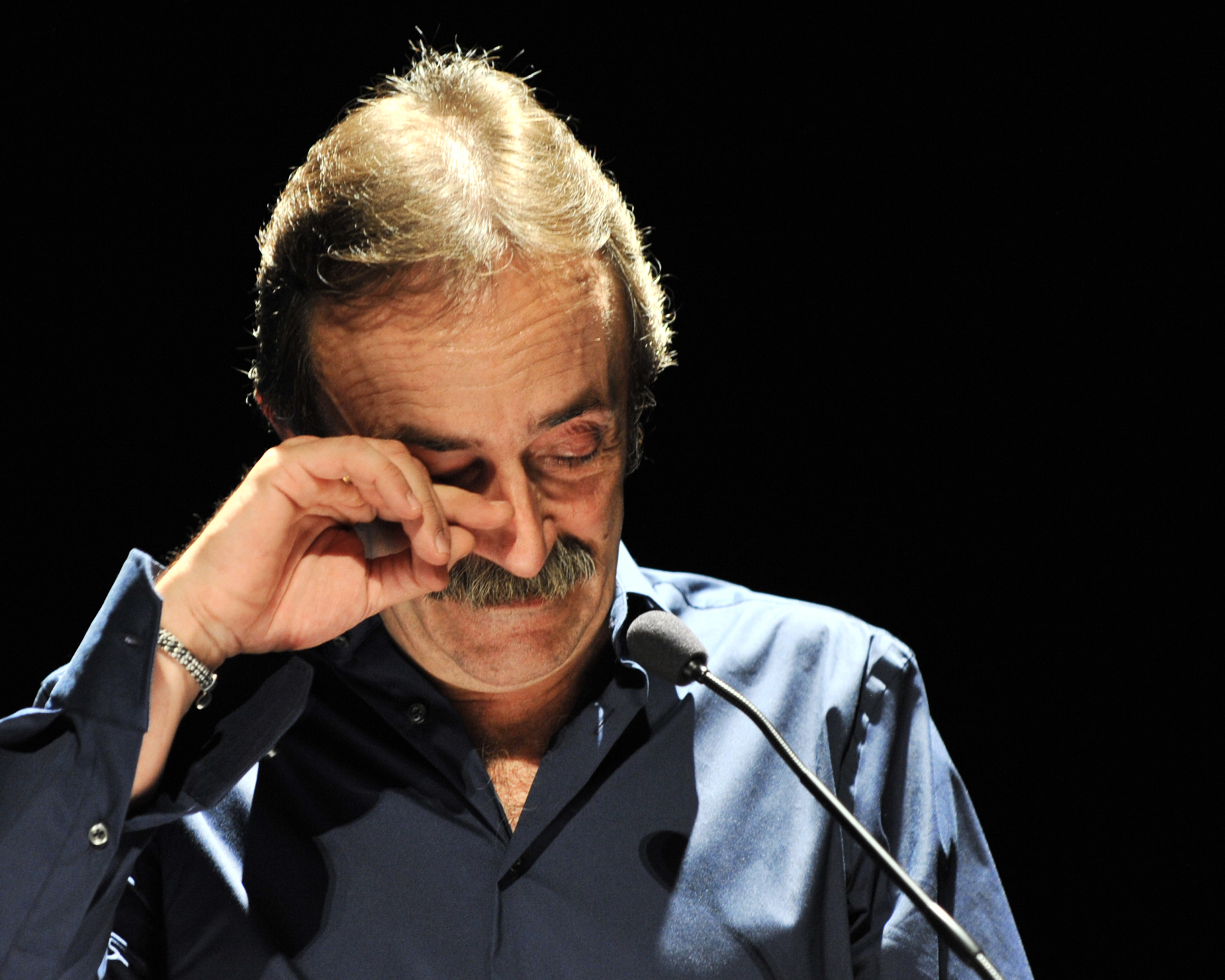 Santi Rodríguez, emocionado en la Gala Síndrome de Down de Jaén Foto:Juan Carlos Fernández